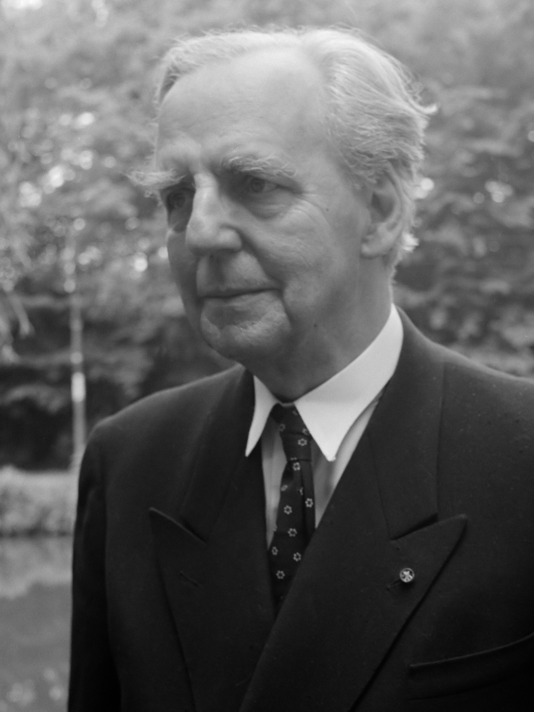 Eduard Verkade (15 juni) 75 jaar 4 juni 1953